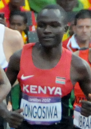 Début de la course de 5000m des JO de Londres. Thomas Pkemei Longosiwa.